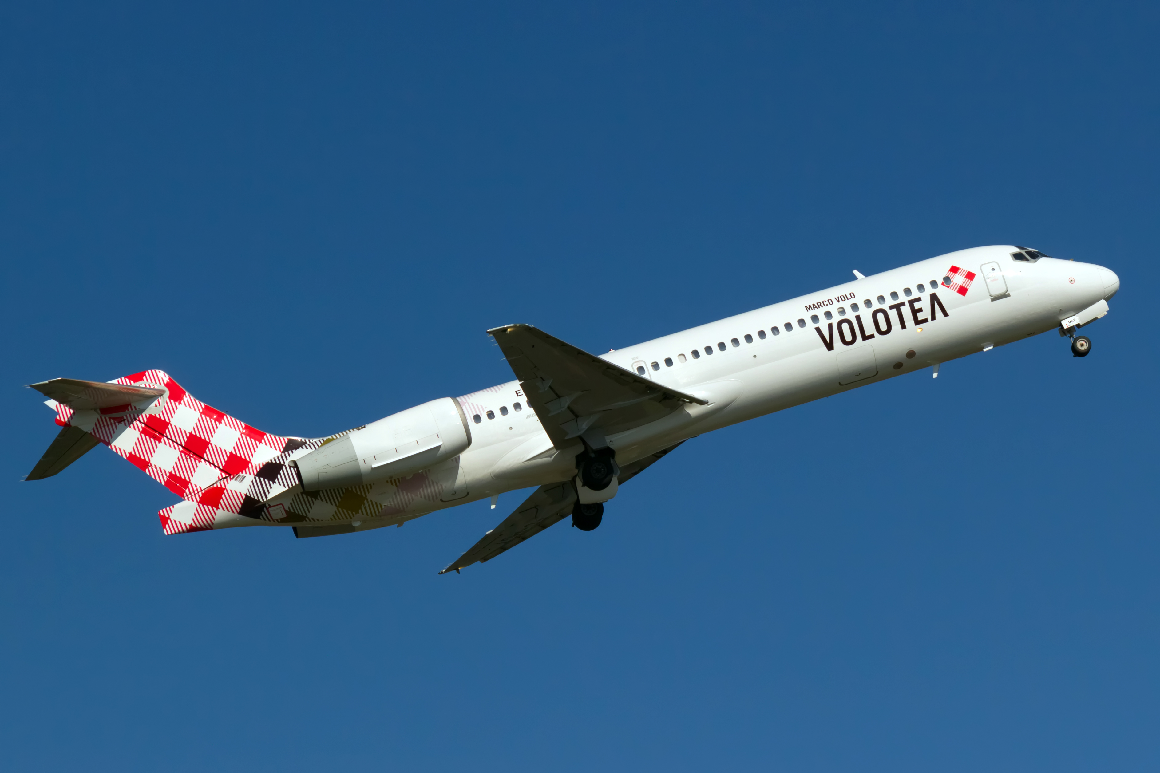 Boeing 717 de Volotea despegando do aeroporto de Vigo.